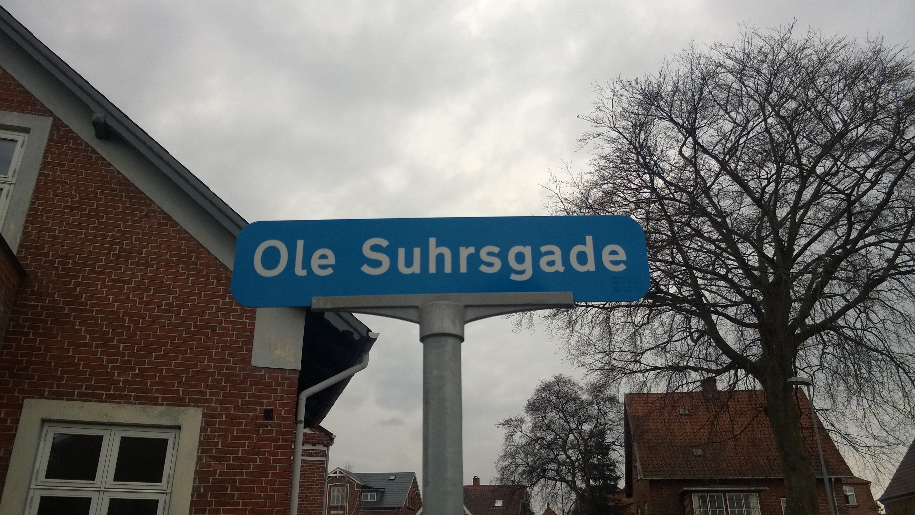 Gadeskilt fra Ole Suhrsgade i Nyborg